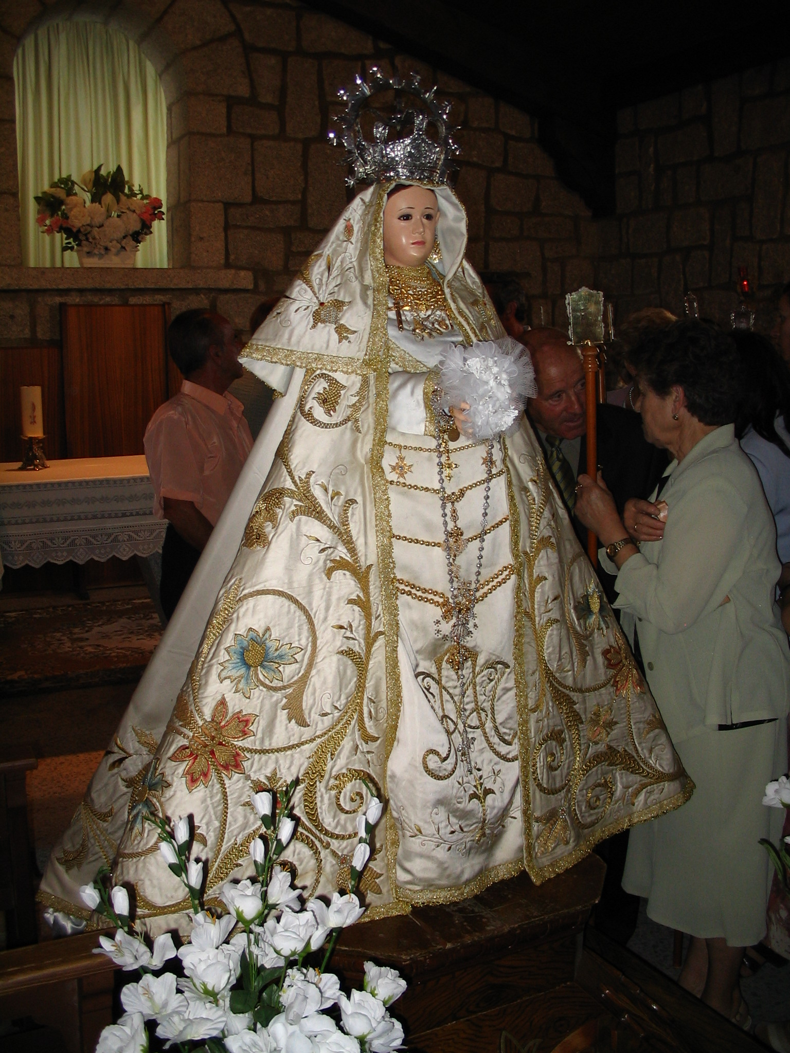 Virgen de la Encina, patrona de Macotera